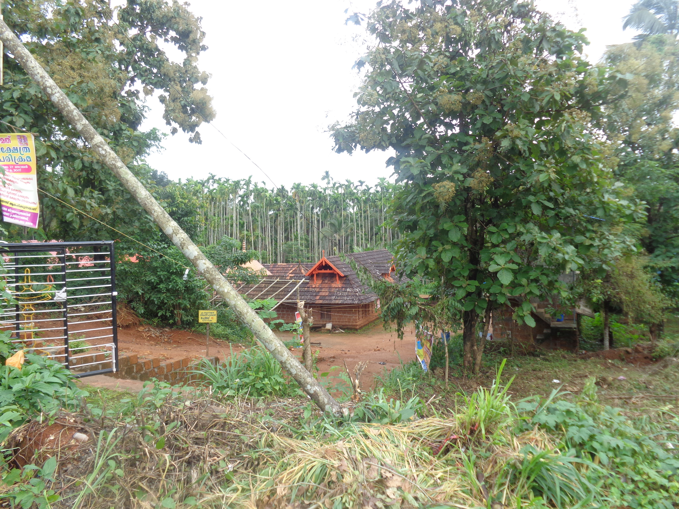 ayodhya lekshmana temple, malappuram